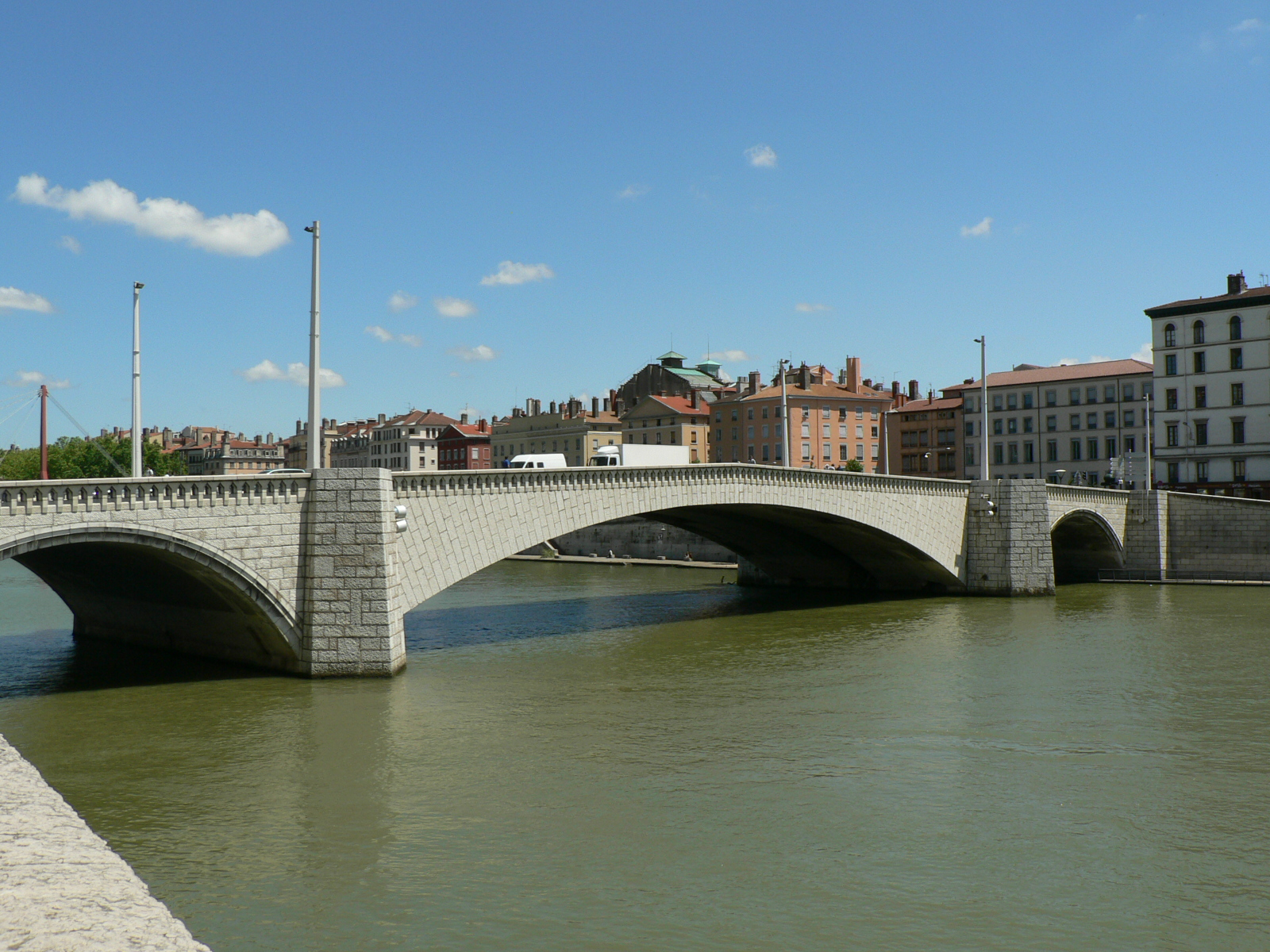 Ponts de Lyon - Pont Bonaparte